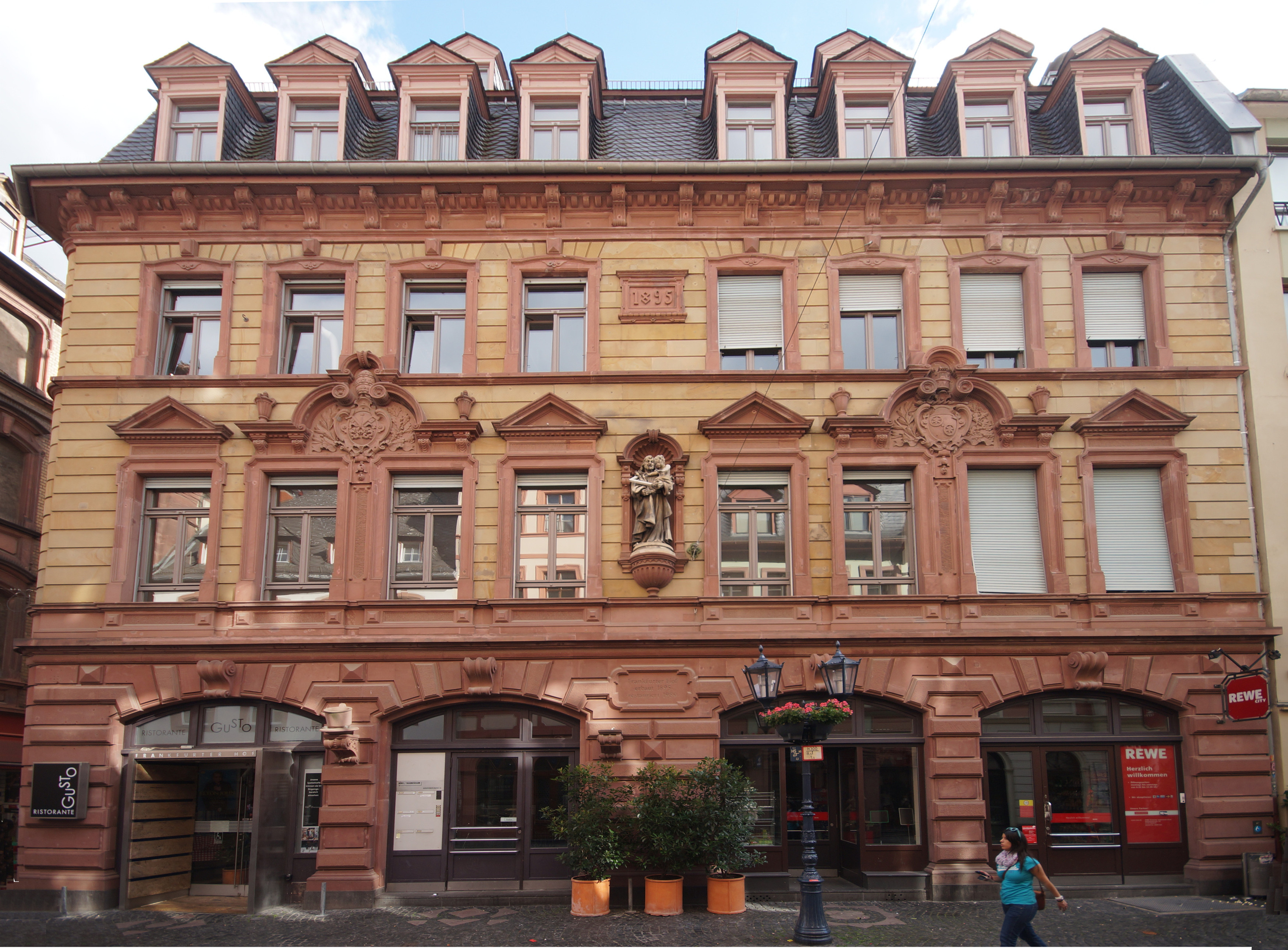 Fassade des Frankfurter Hofs in der Augustinerstraße 55 in Mainz